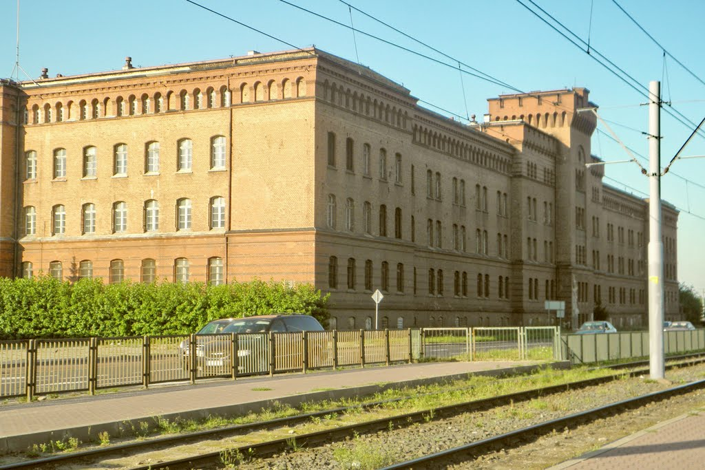 Gdańsk, ul. Ułańska. Budynek dawnych koszar.